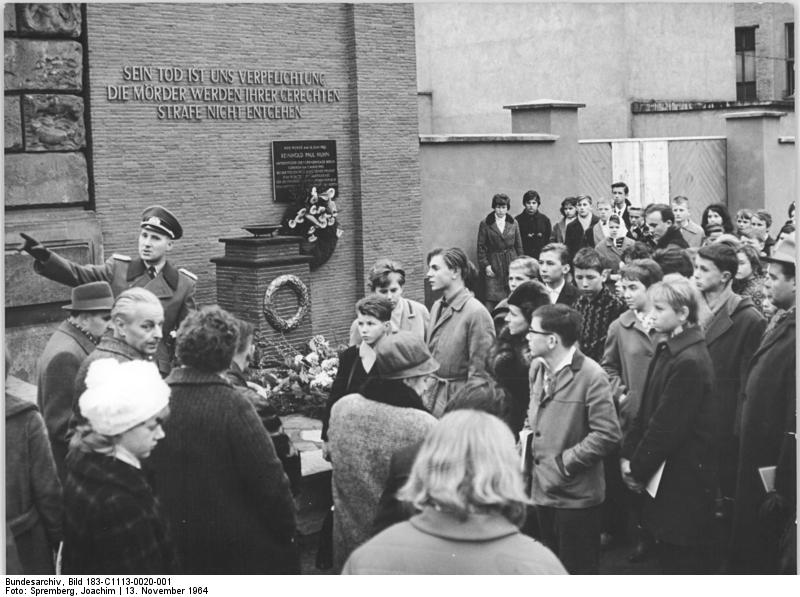 Berlin, Jugendstunde, Gedenkstätte für Reinhold Huhn Zentralbild Spremberg 13.11.1964 Jugendweihe-Teilnehmer aus mehreren Bezirken der DDR legten am 13.11.1964 an der Gedenkstätte des am 18.6.1962 von Westberliner Terroristen ermordeten Grenzsoldaten Reinhold Huhn Kränze nieder. Hier erläutert Major Günter Ganßauge den feigen Überfall im Juni 1962 auf dem Grenzsoldaten.